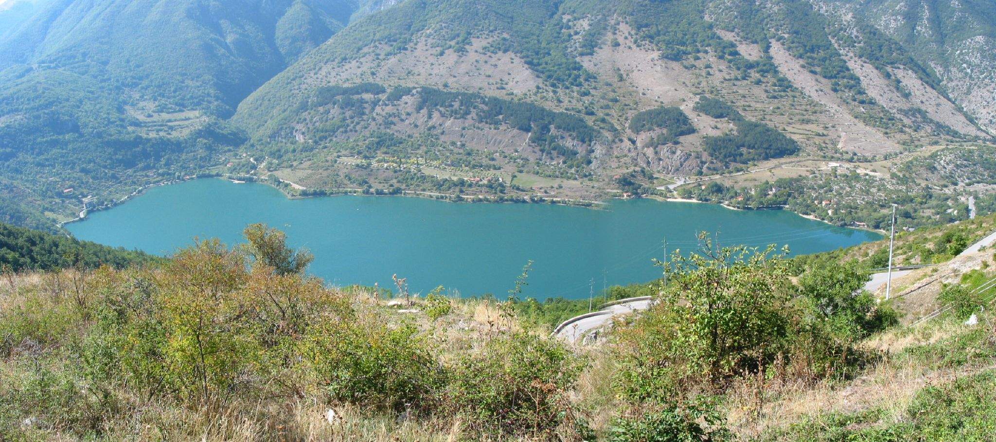 lago di Scanno, Abruzzo, Italia